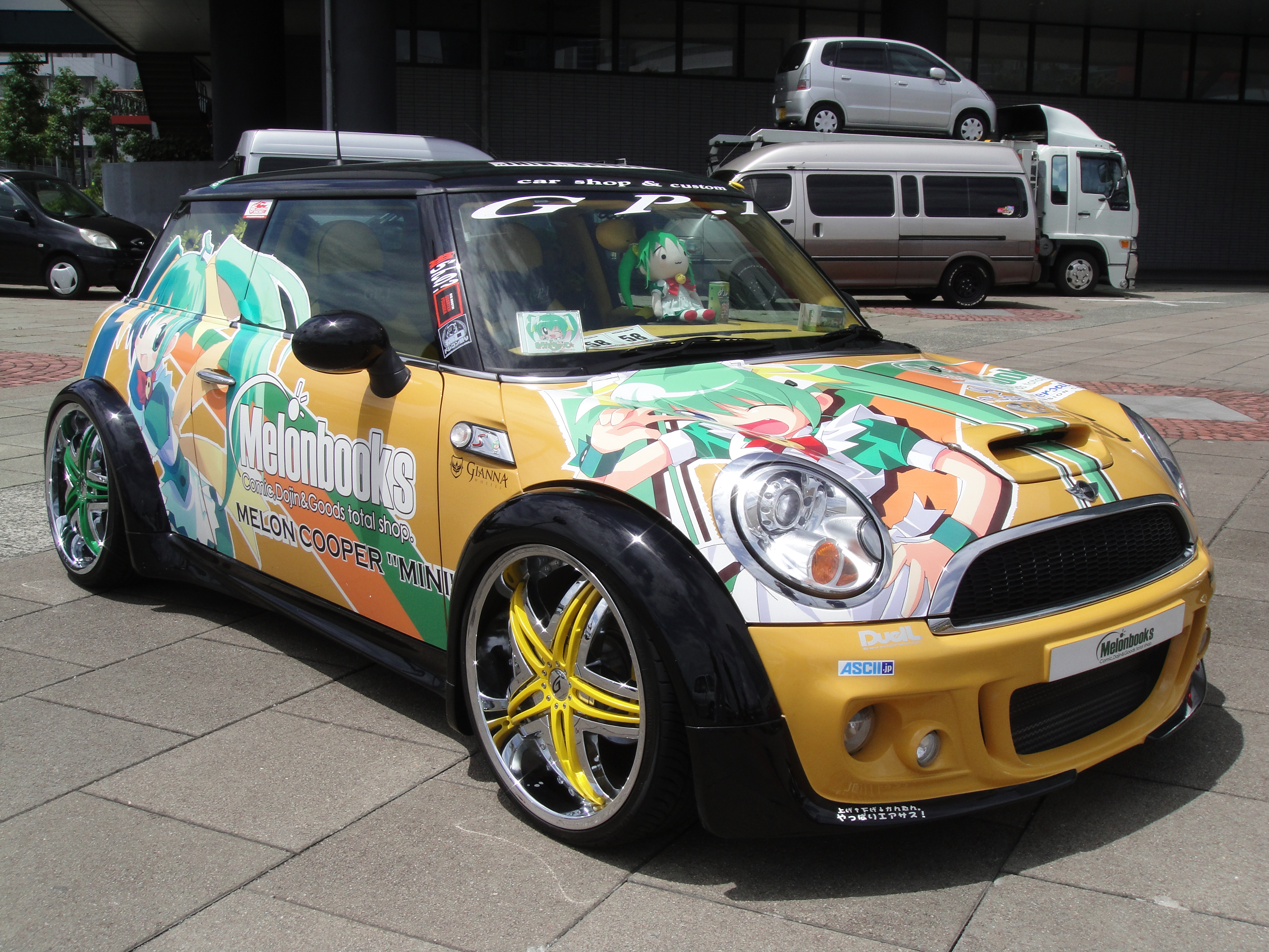 中文（台灣）: Melonbooks看板娘「小蜜瓜」（めろんちゃん）痛車。